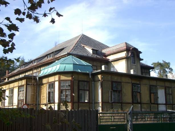 Budova kantýny na Střílně (město Plzeň, katastr Bolevec)